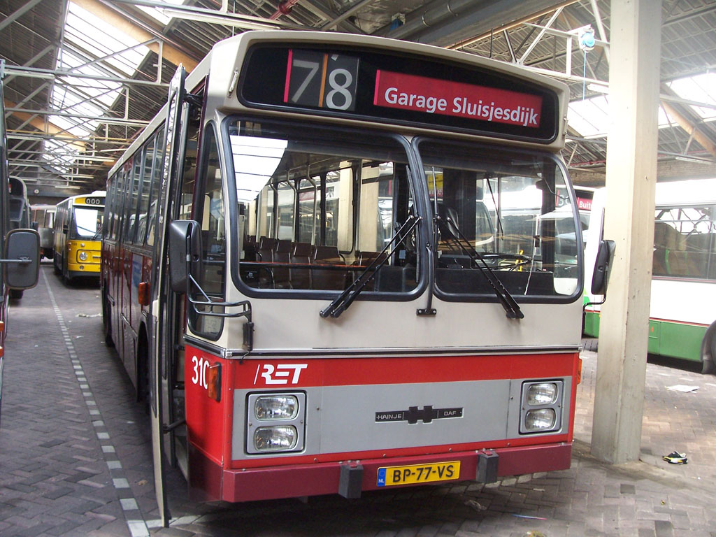 De RET 310 op de Rotterdamse Sluisjesdijk.